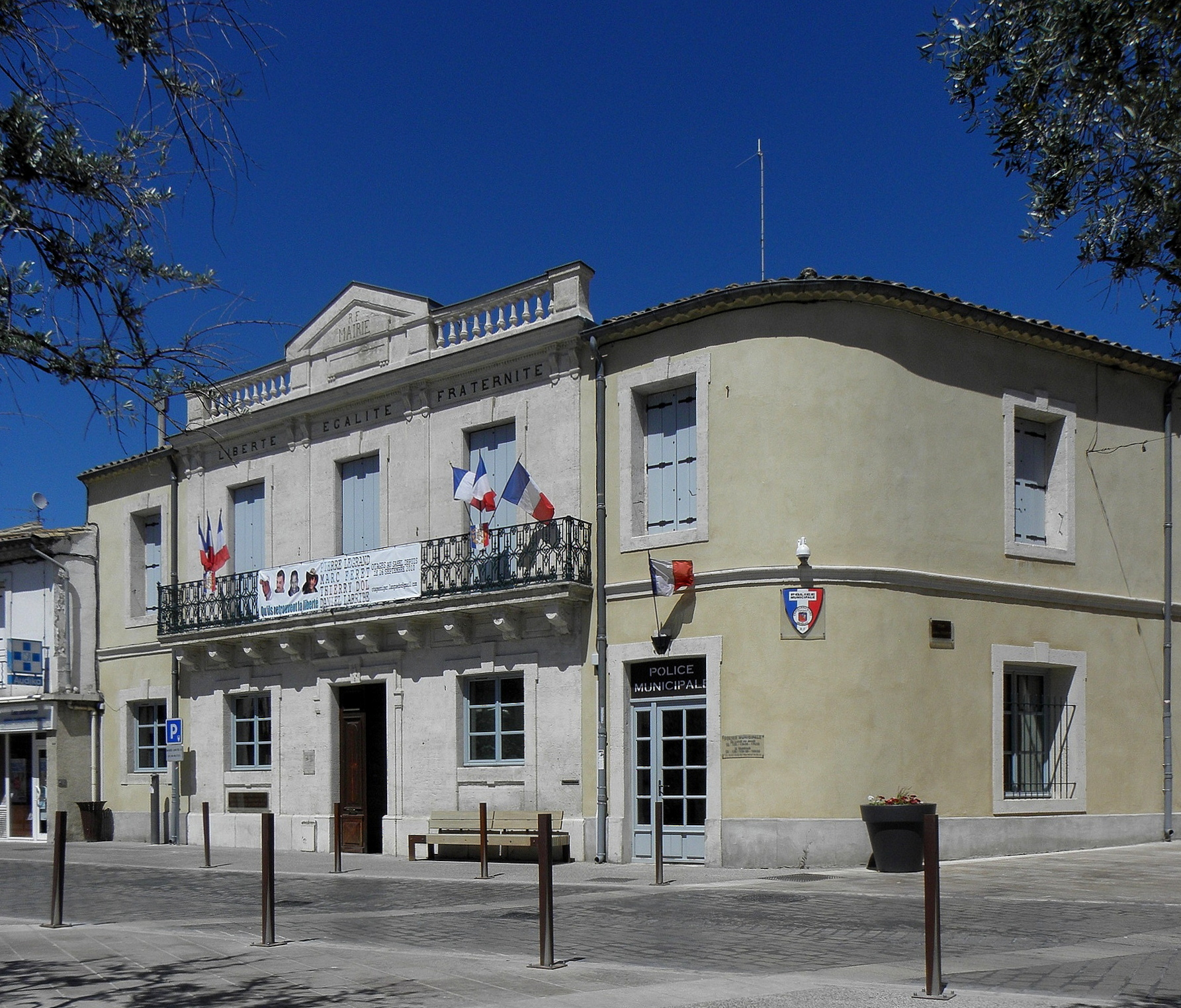 Ancienne mairie de Castelnau-le-Lez (34) abritant le Centre régional de la Résistance et de la Déportation.